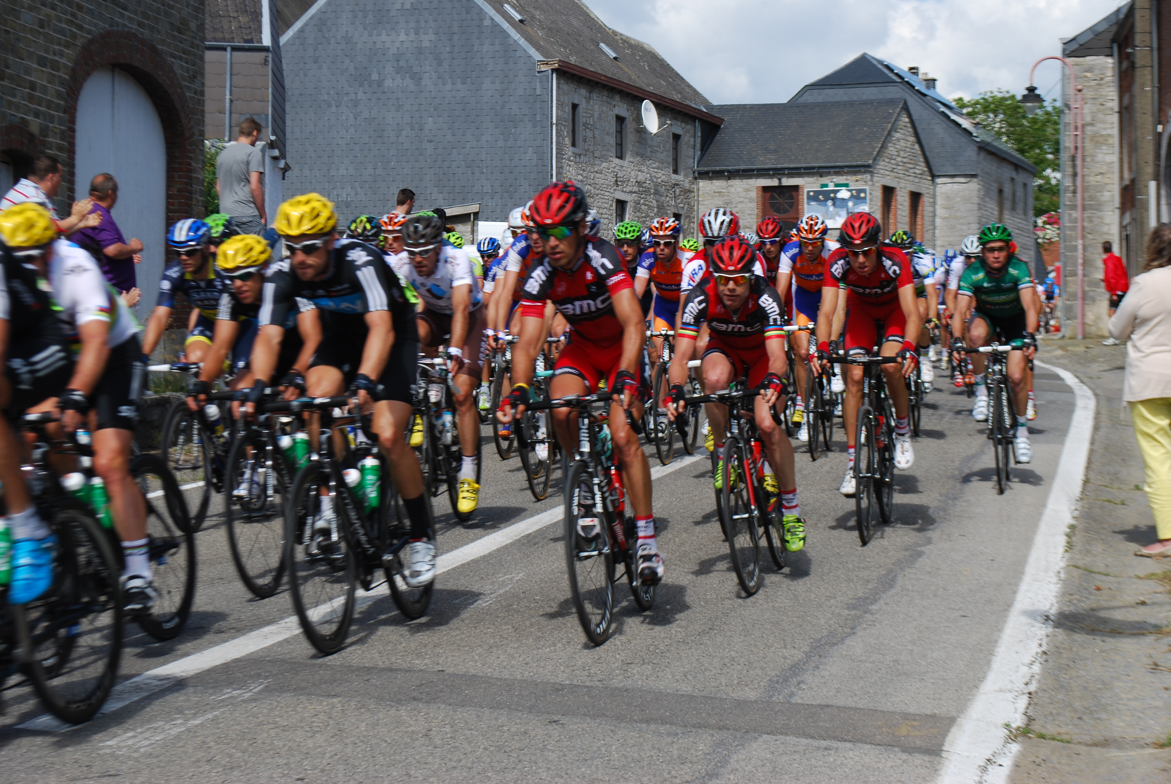 Vue dVue du passage du peloton du Tour de France 2012 à Tohogne (Durbuy).